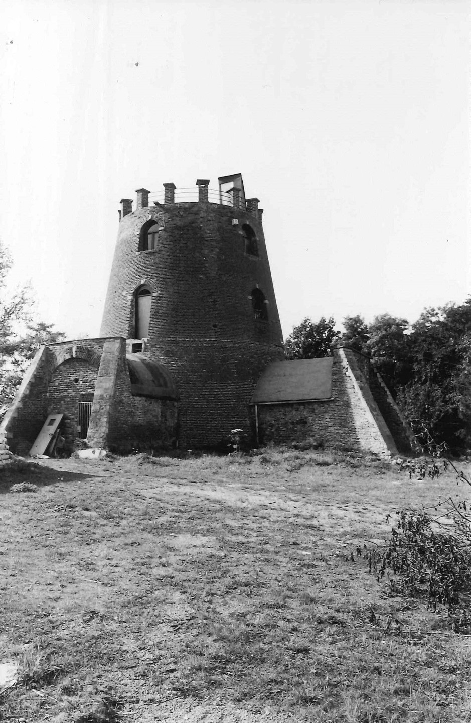 Kortessem Hoogveldstraat zonder nummer